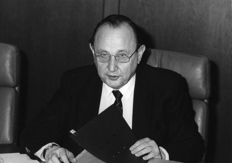 Bonn, 8. Februar 1984 Kabinettsitzung